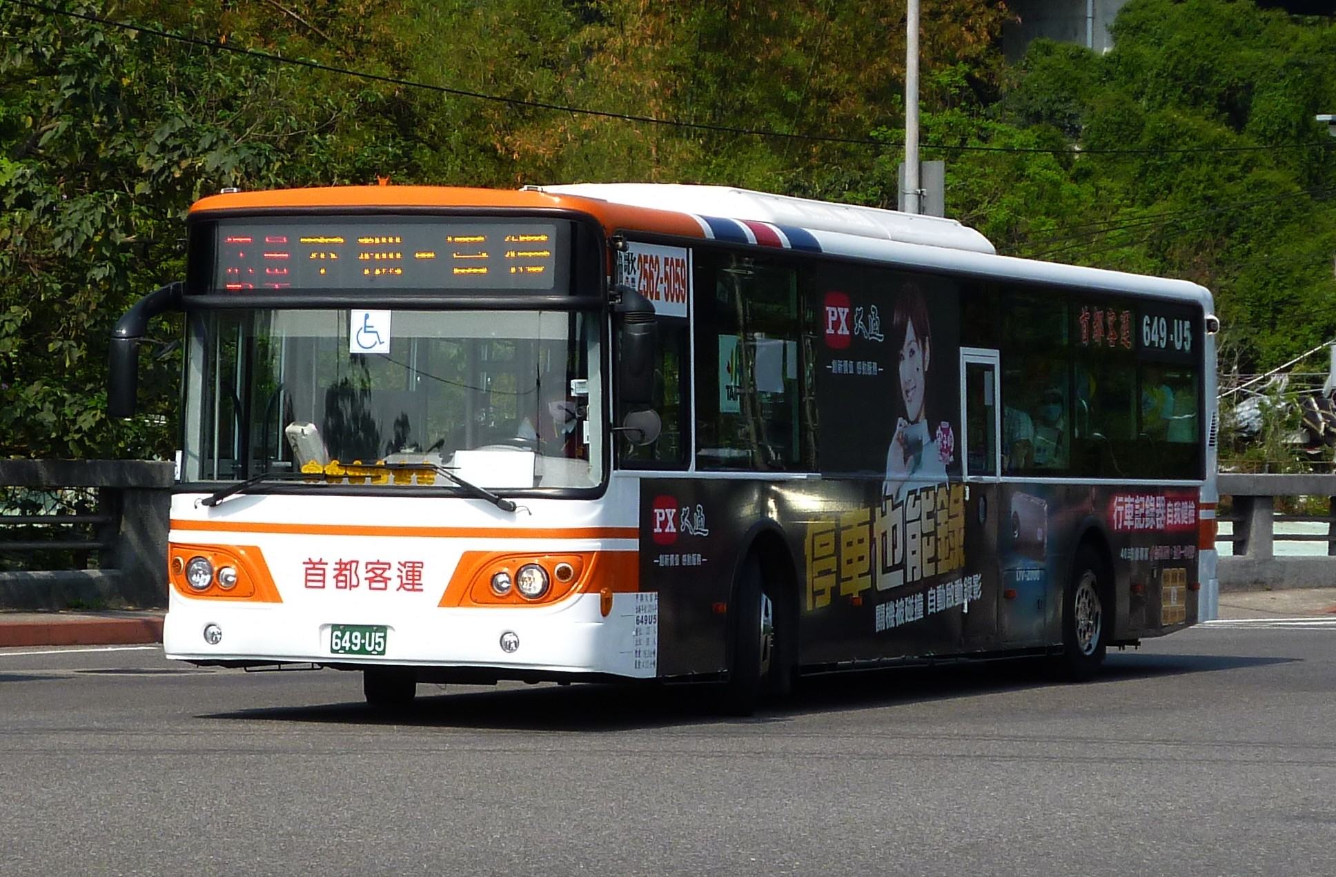 首都客運2014年大宇低地板公車649-U5，行駛臺北市掃墓公車動物園線。